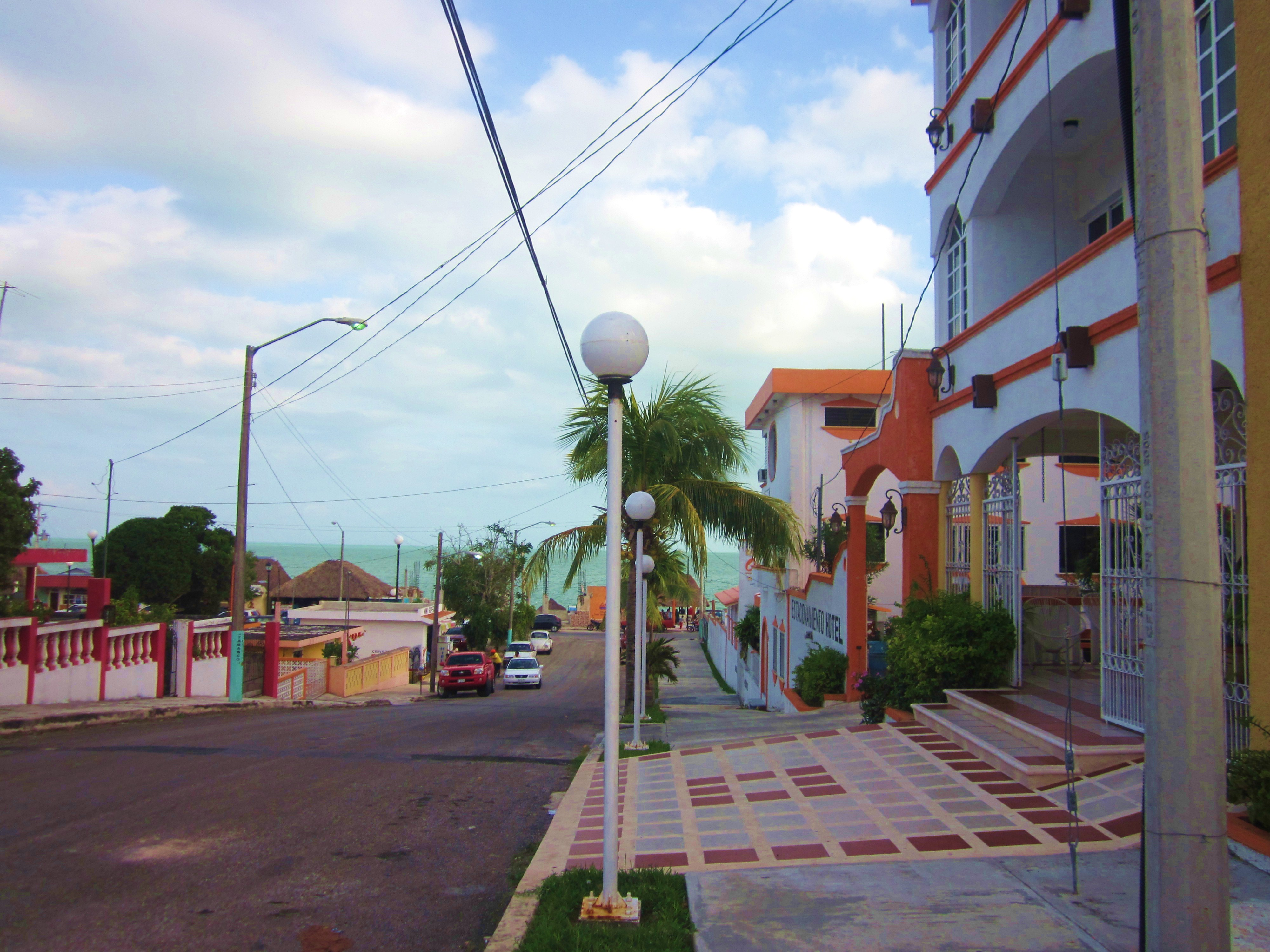 Atardece en Calderitas, Q. Roo.